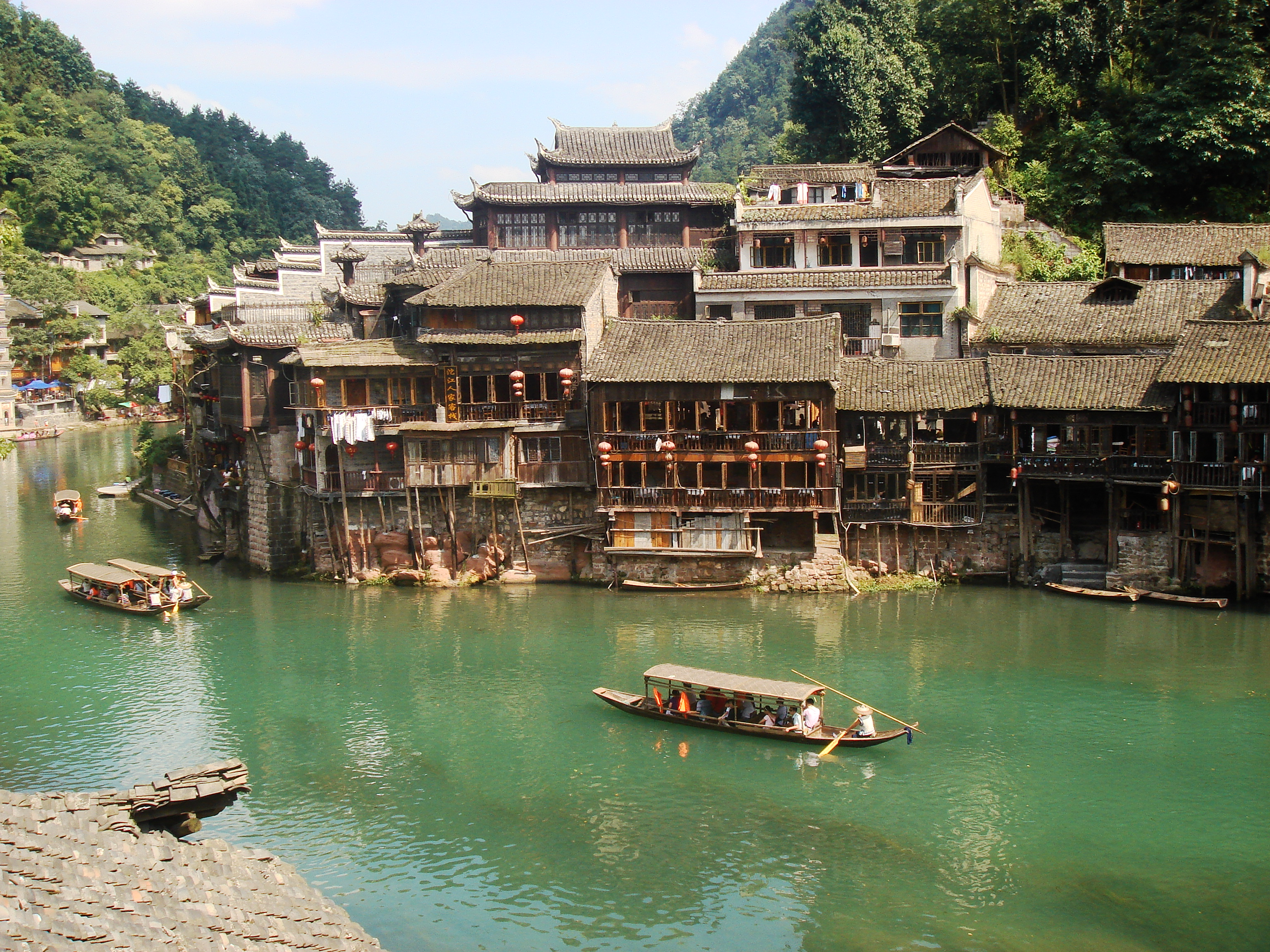 Fenghuang old town in Xiangxi, hunan, China. 中国湖南省湘西州的凤凰古城。